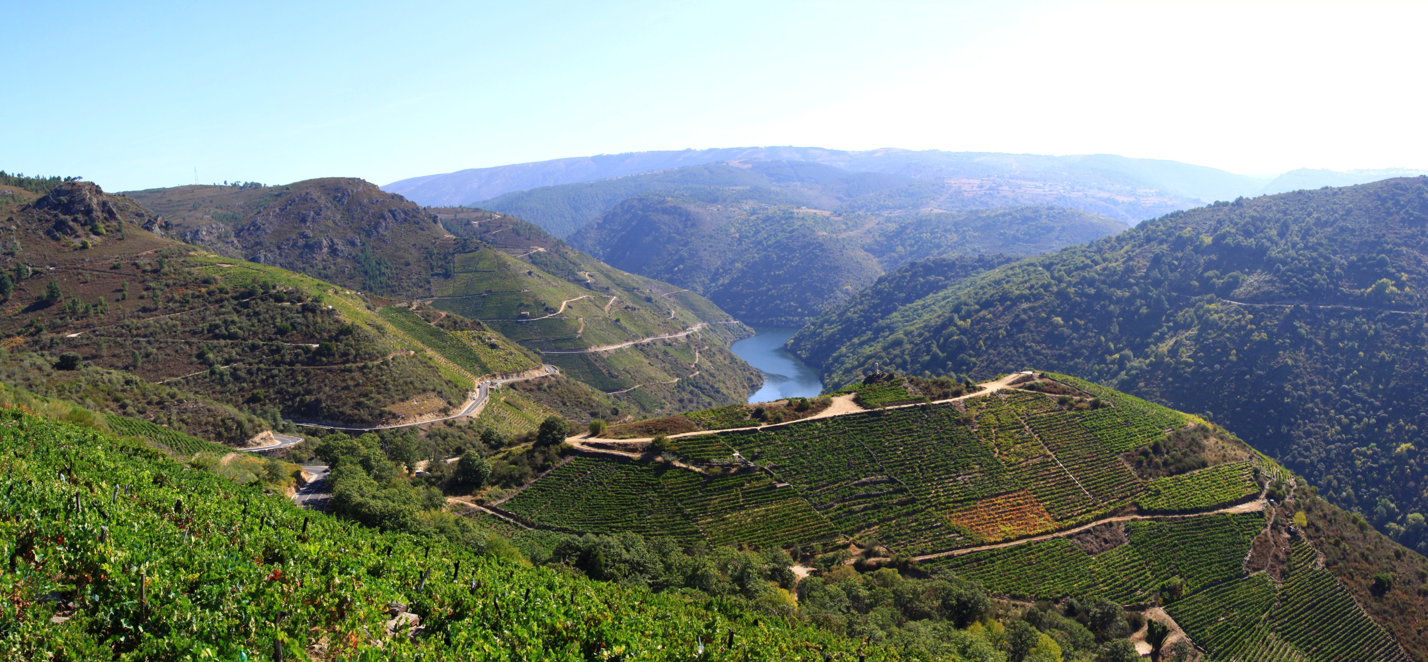 San Martiño de Doade é unha parroquia do concello de Sober, na comarca da Terra de Lemos, na provincia de Lugo. Segundo o IGE, no ano 2007 tiña unha poboación de 164 habitantes, 75 eran homes e 89 eran mulleres.